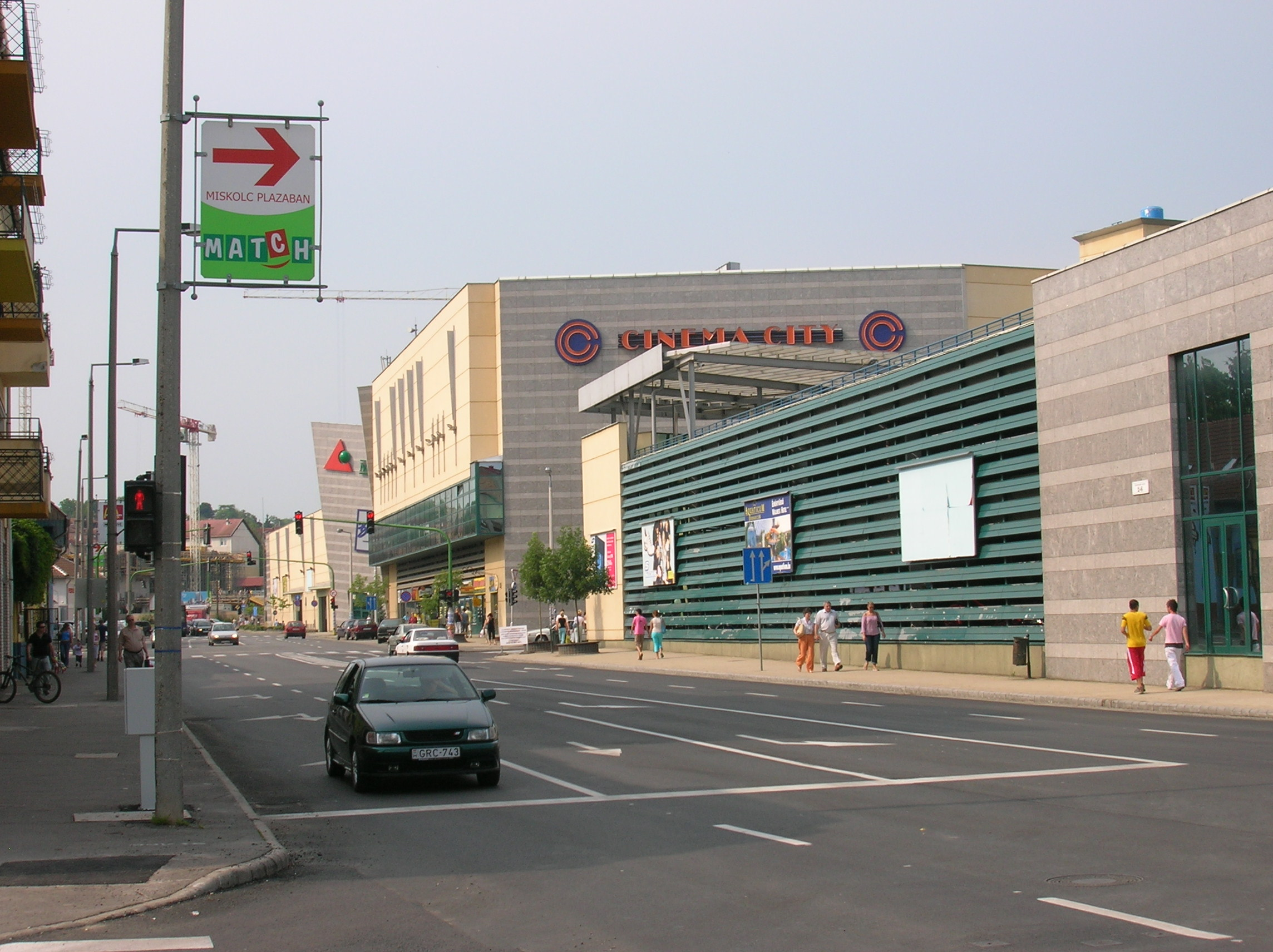 Miskolc Plaza shopping mall in Miskolc, Hungary.